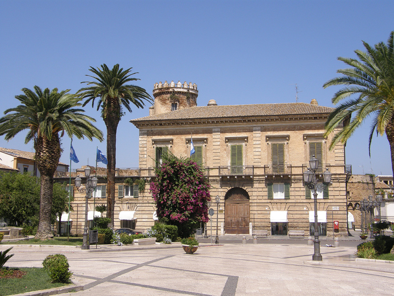 Vasto